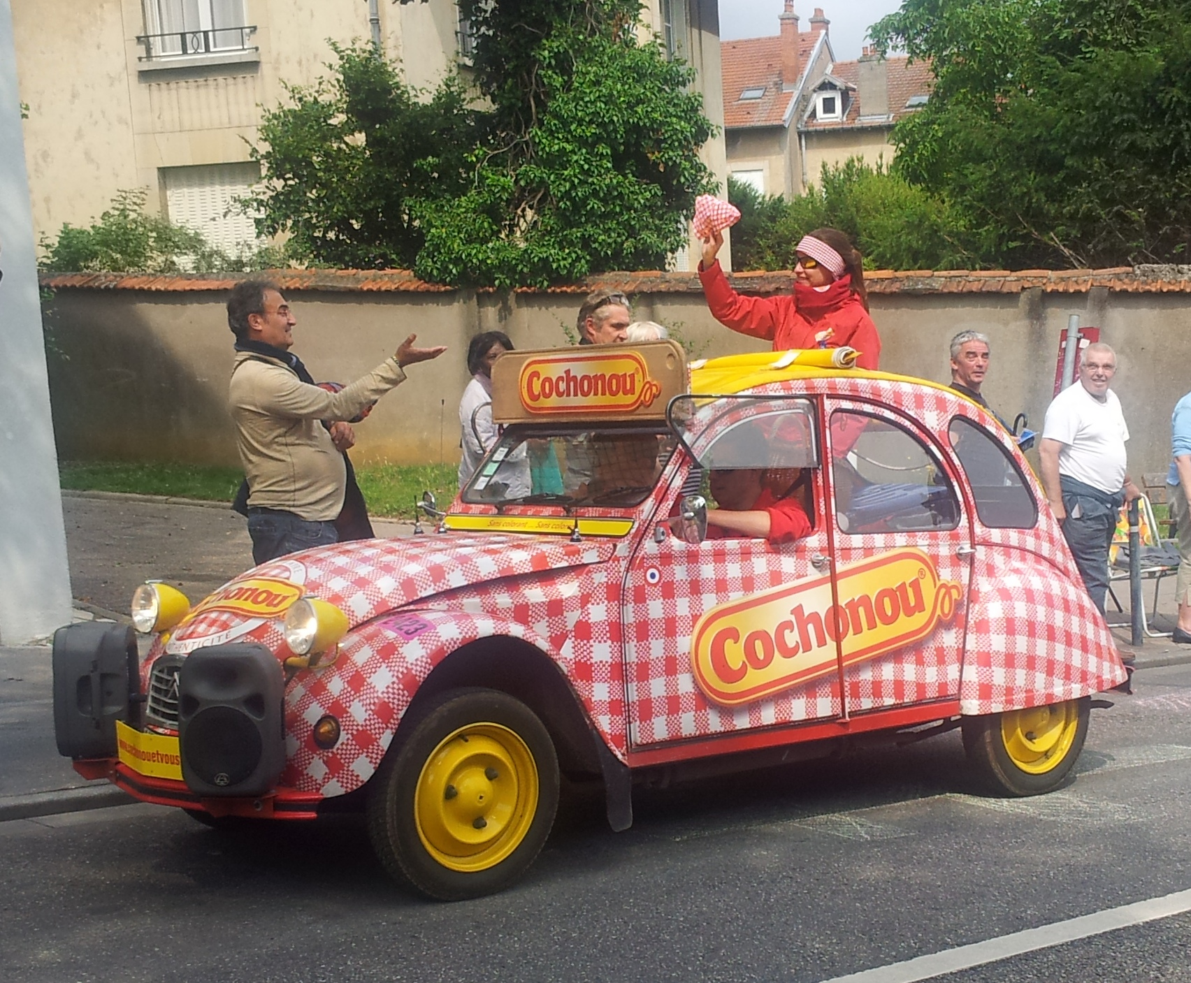 Véhicule de la caravane du Tour de France 2014 dans la côte de Boufflers à Nancy (7e étape).